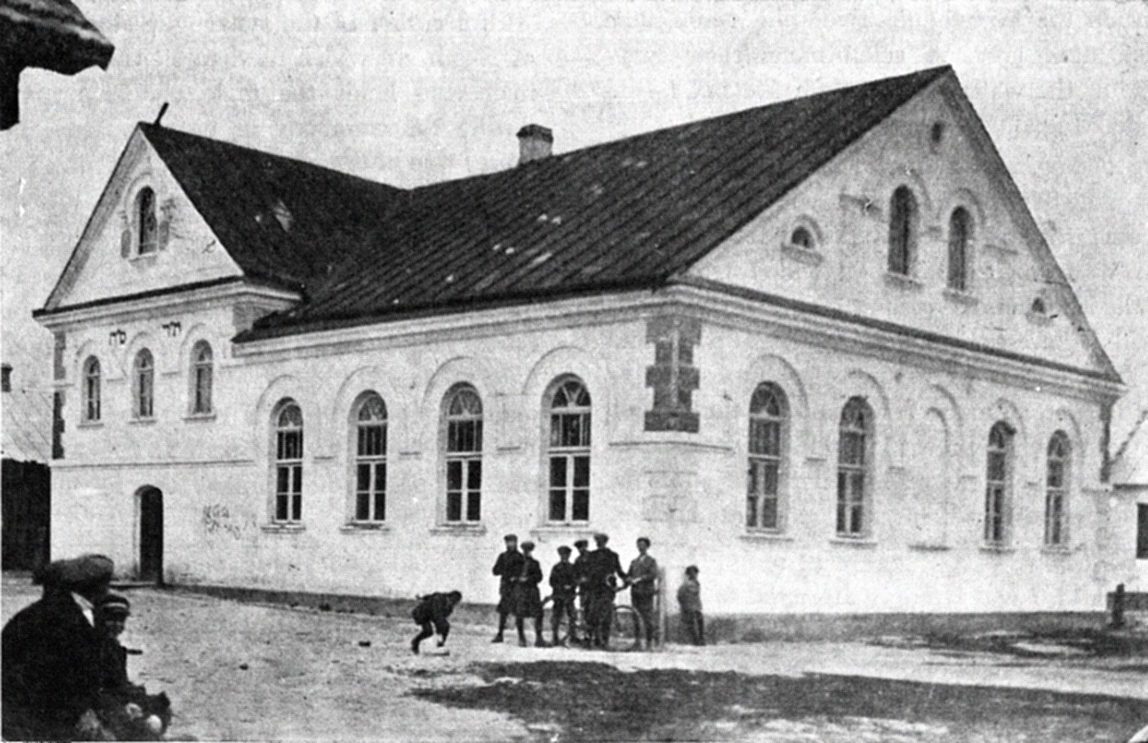 Беларуская (тарашкевіца): Антопаль (Antopal), Школьны Двор (Školny Dvor). Юдэйская малітоўная школа